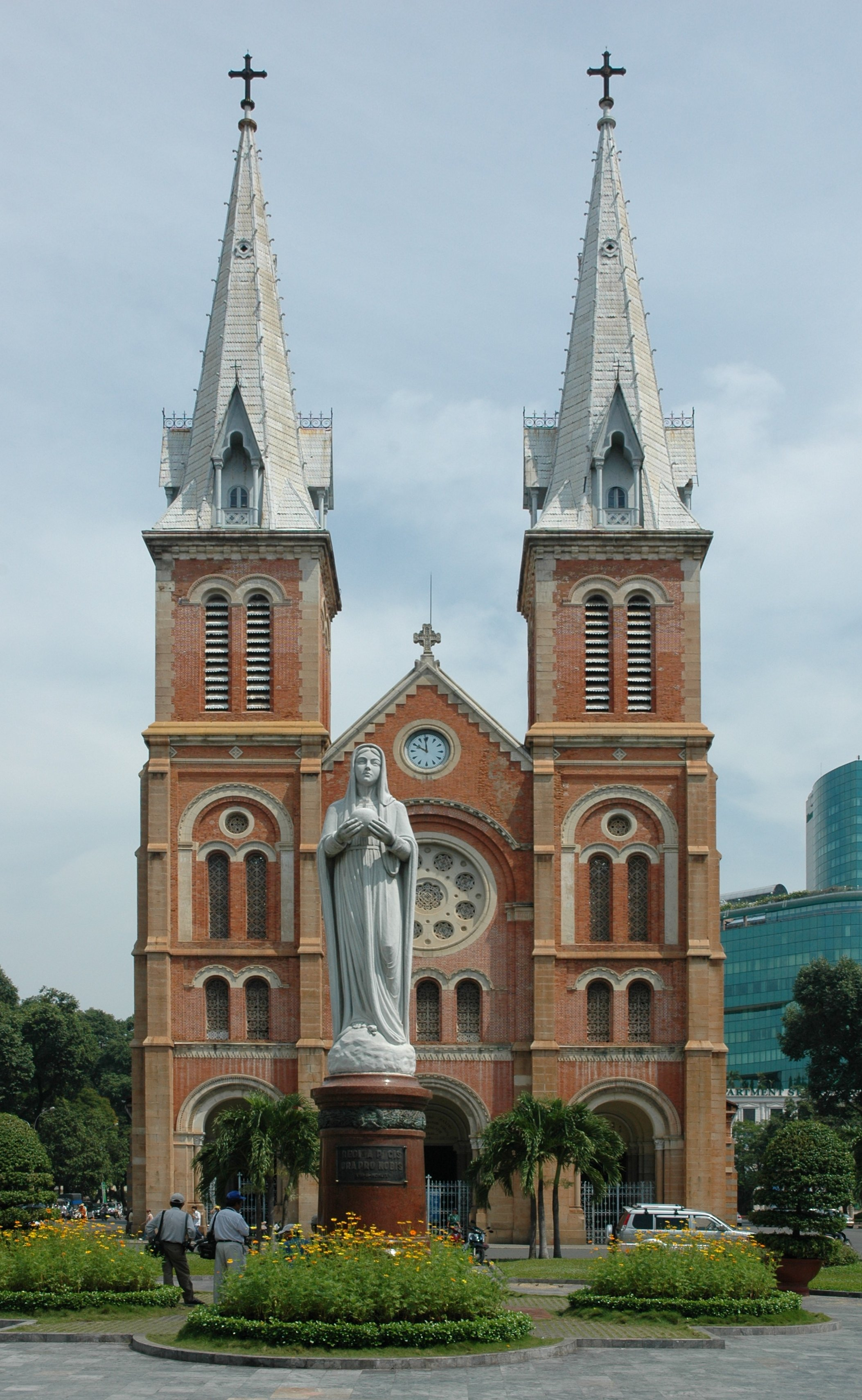 Nhà thờ Đức Bà, thành phố Hồ Chí Minh. Notre Dame cathedral in Ho Chi Minh City, Vietnam